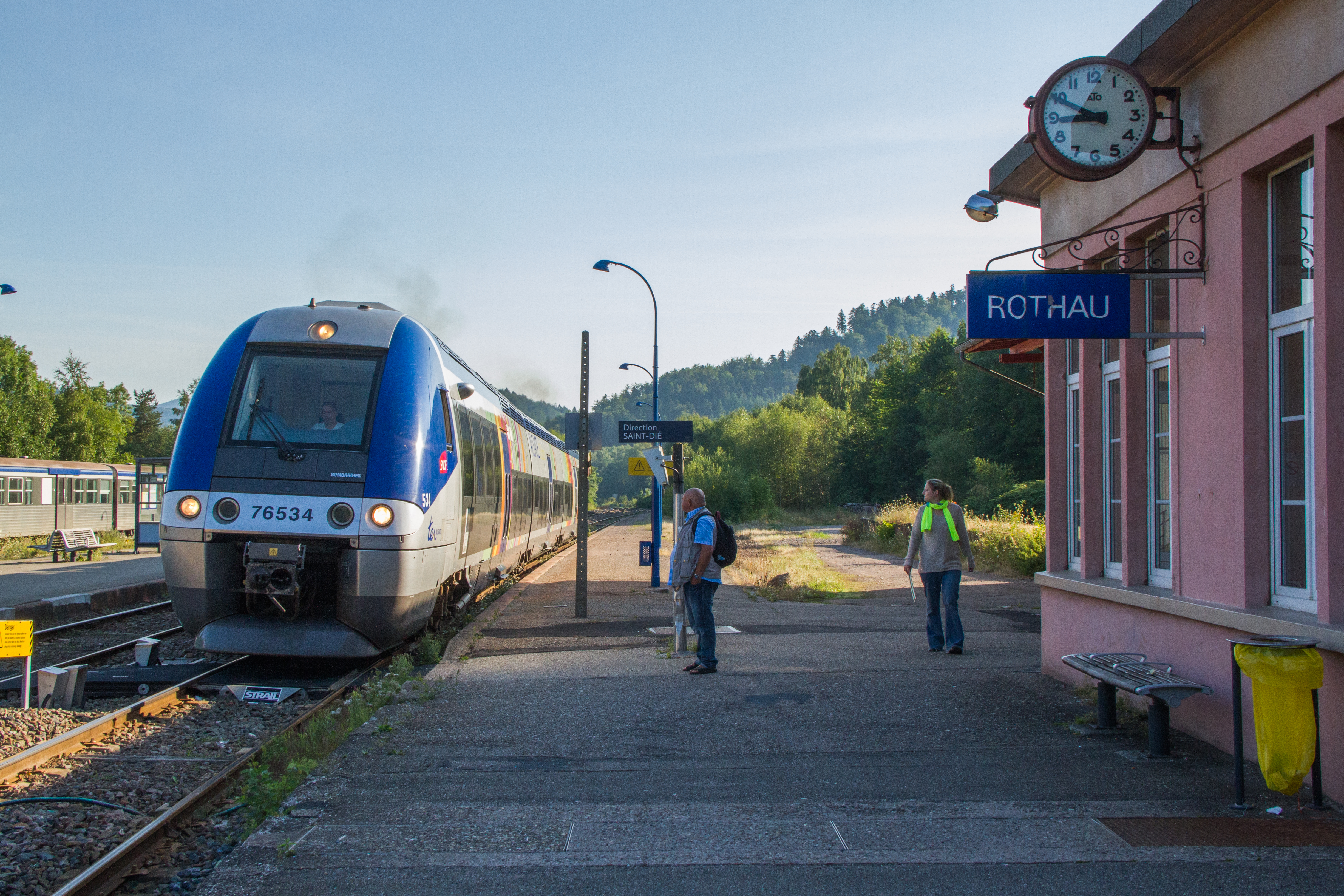 Gare SNCF de Rothau, 15 août 2013